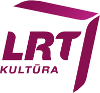 Logo des Fernsehsenders LRT Kultūra